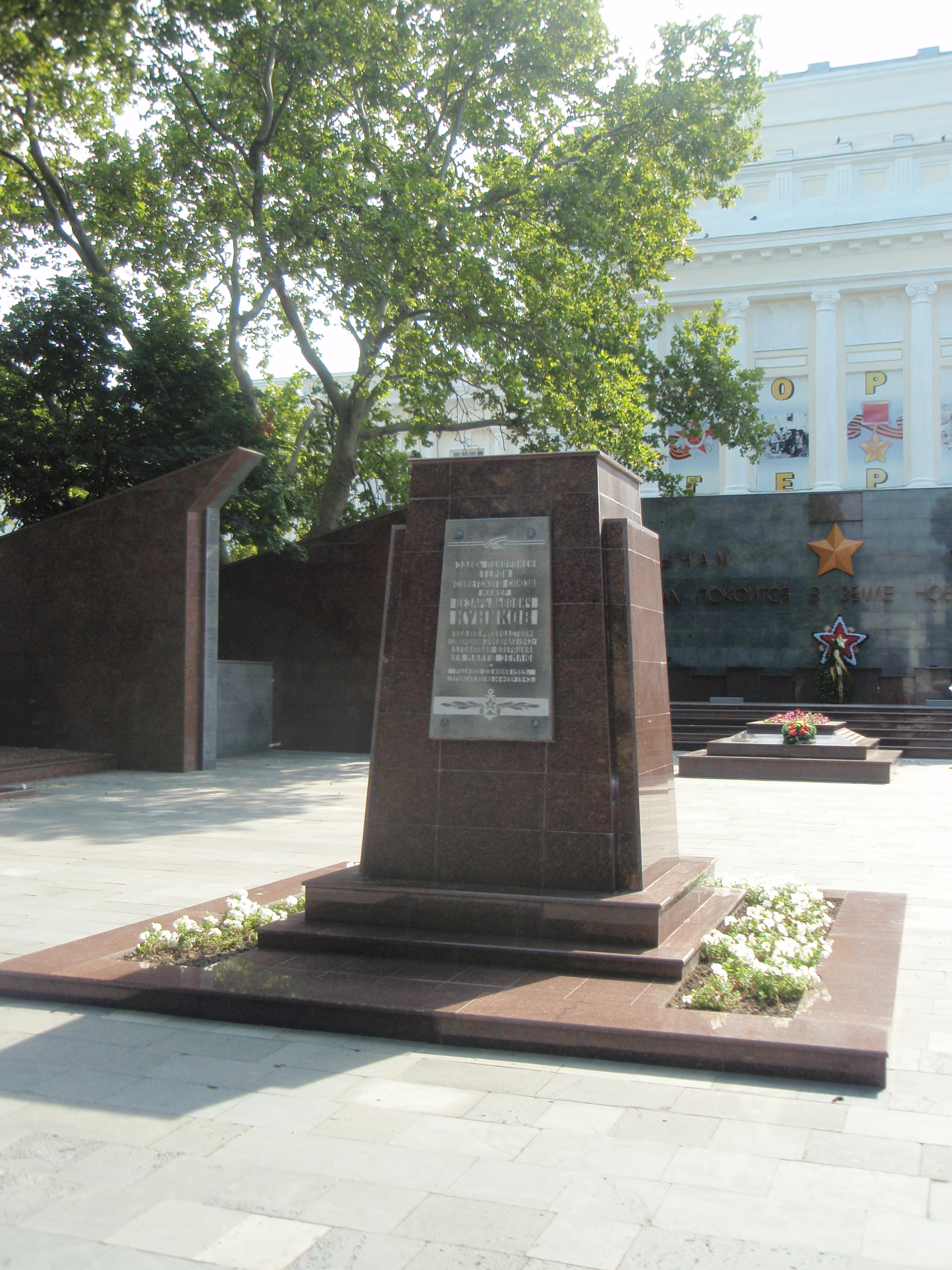 Памятник майору Ц.Л.Куникову (г.Новороссийск) = Лицензирование == Категория:Изображения:Памятники Категория:Изображения:Новороссийск